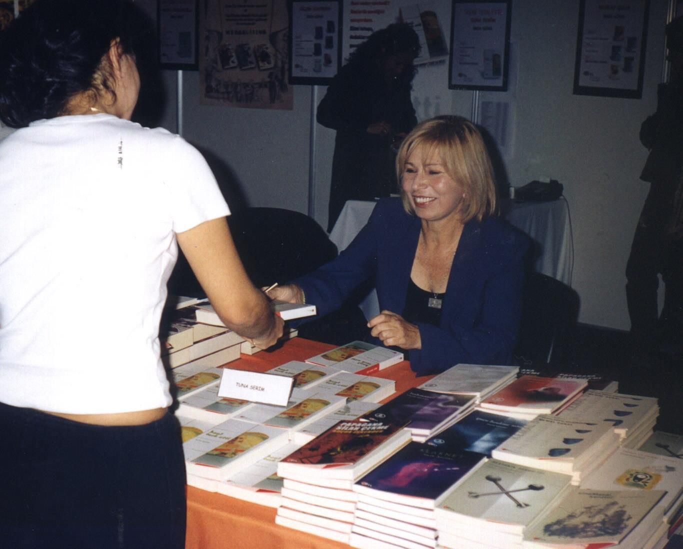 Tuna Serim, eine türkische Romanschriftstellerin